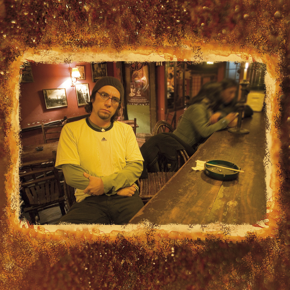 sesion de fotos disco banda ancha 2007